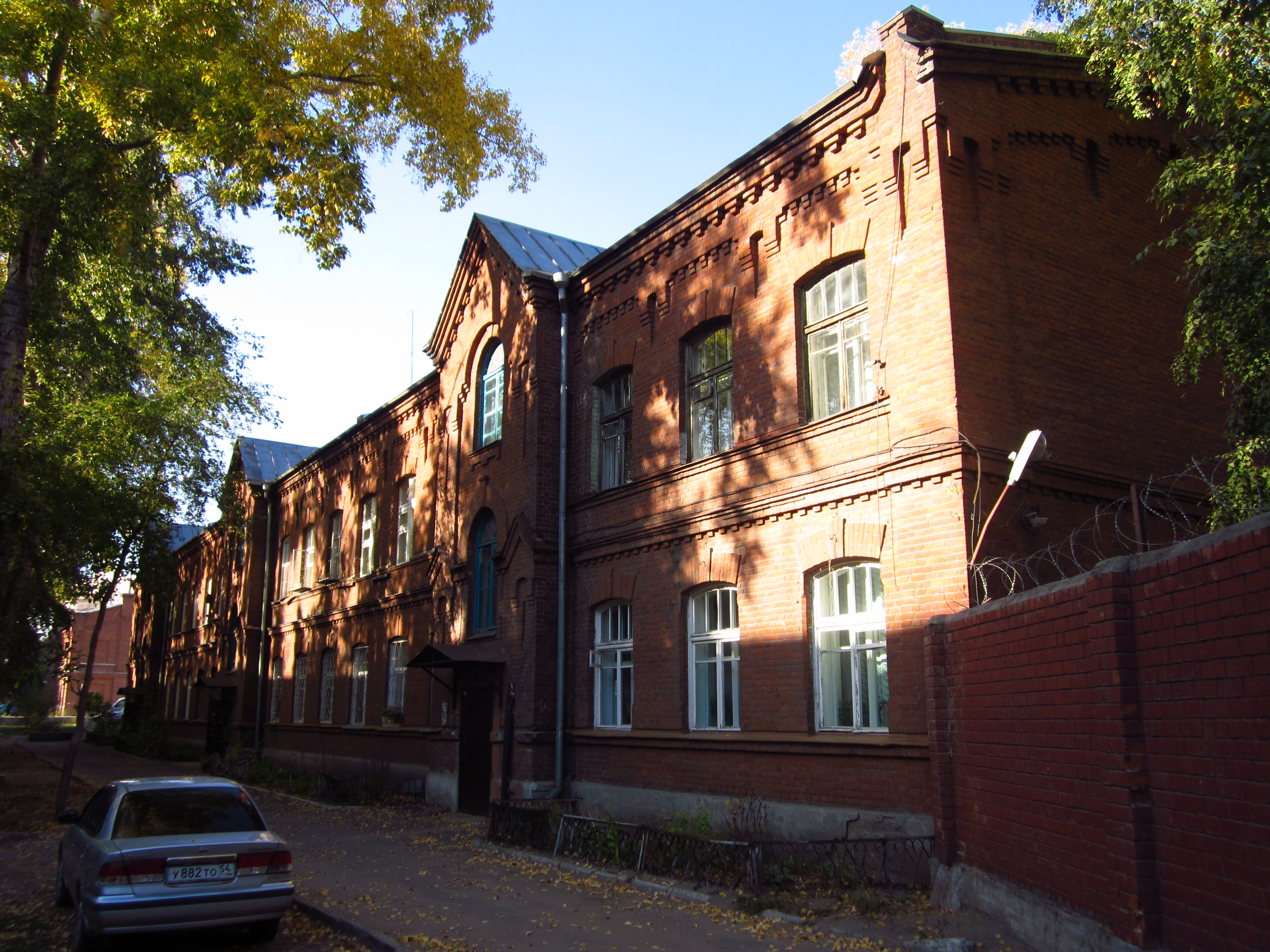 Дом мясохладобойни ул. Сухарная 68/1. Построен в начале XX века.